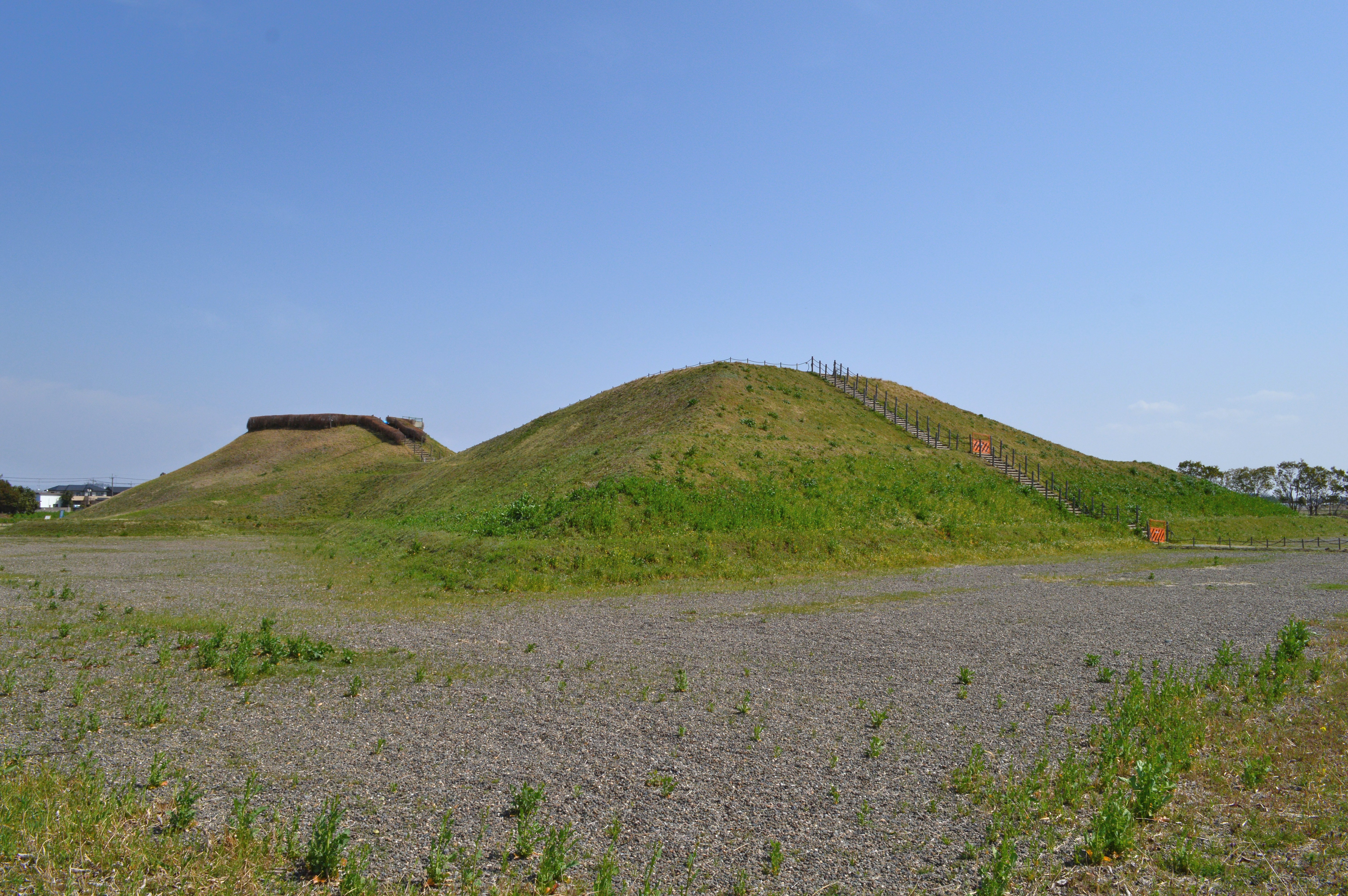 稲荷山古墳 (行田市) 墳丘全景